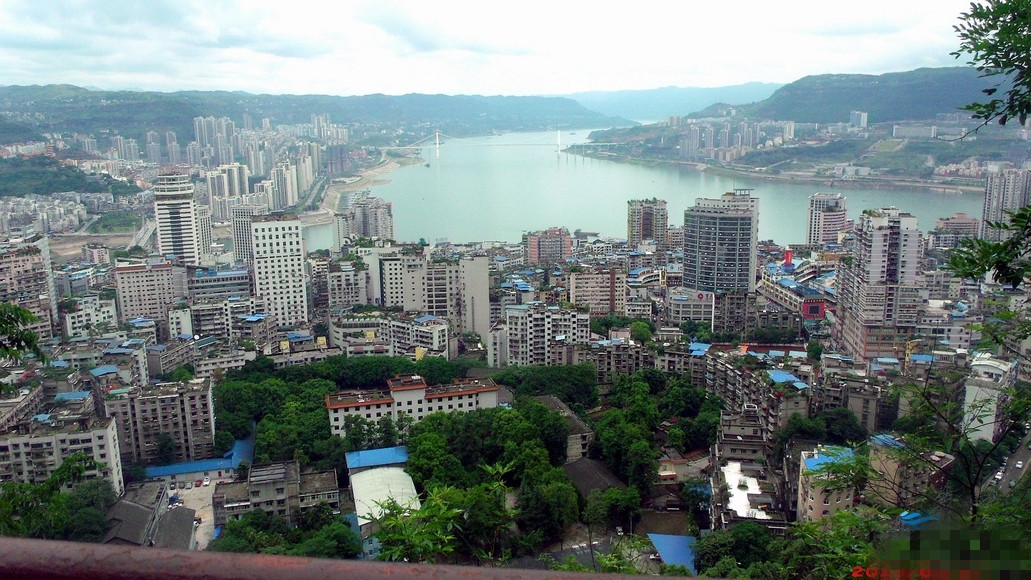 2013年5月太 白 岩 上 拍 万 州8